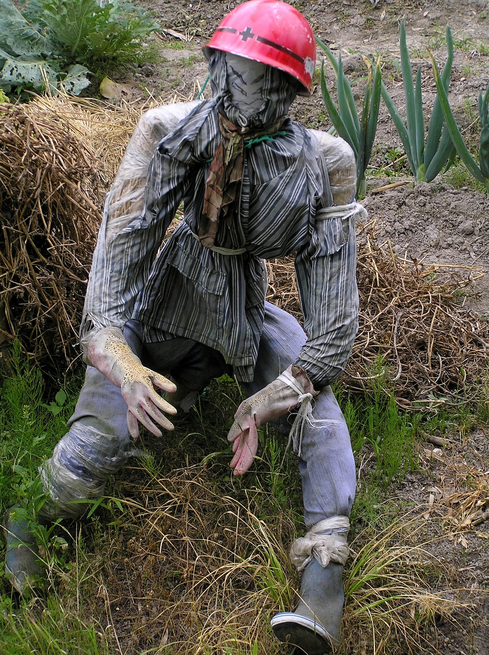 安全帽を被った案山子